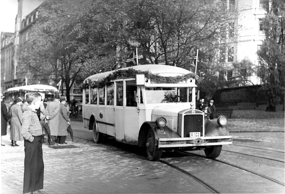 Buss på Tordenskiolds plass (1935). Oslo Sporveiers buss av type ACF i forbindelse med jubileumskortesjen ved 60-års jubileet for sporveisdriften i 1935.